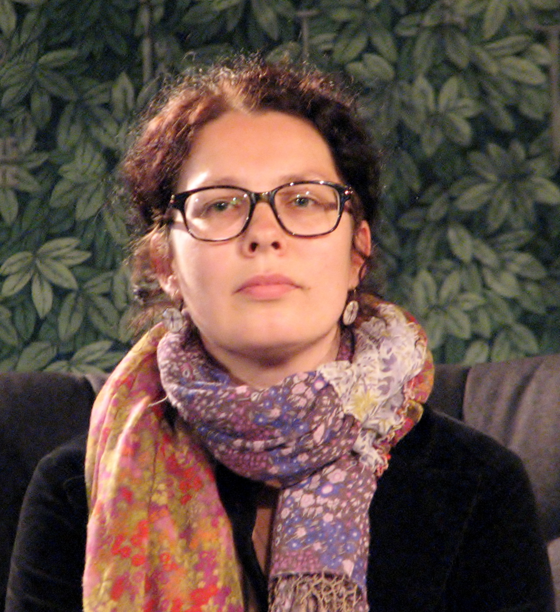 Veronika Kivisilla esinemas kirjandusfestivali HeadRead raames Tallinna kirjanike maja musta laega saalis